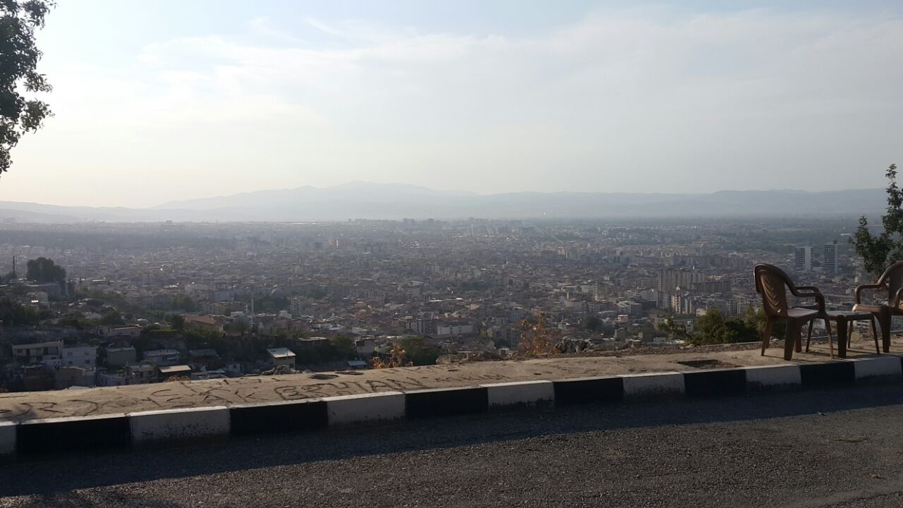 Mevlevihaneden Manisa MerkezŞehzadeler İlçesi